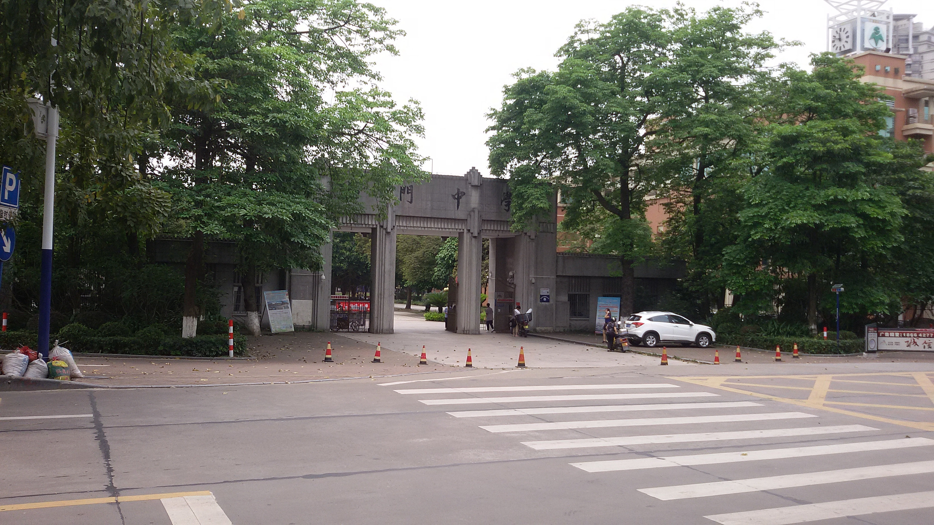 粵語: 佛山市石門中學嘅正門